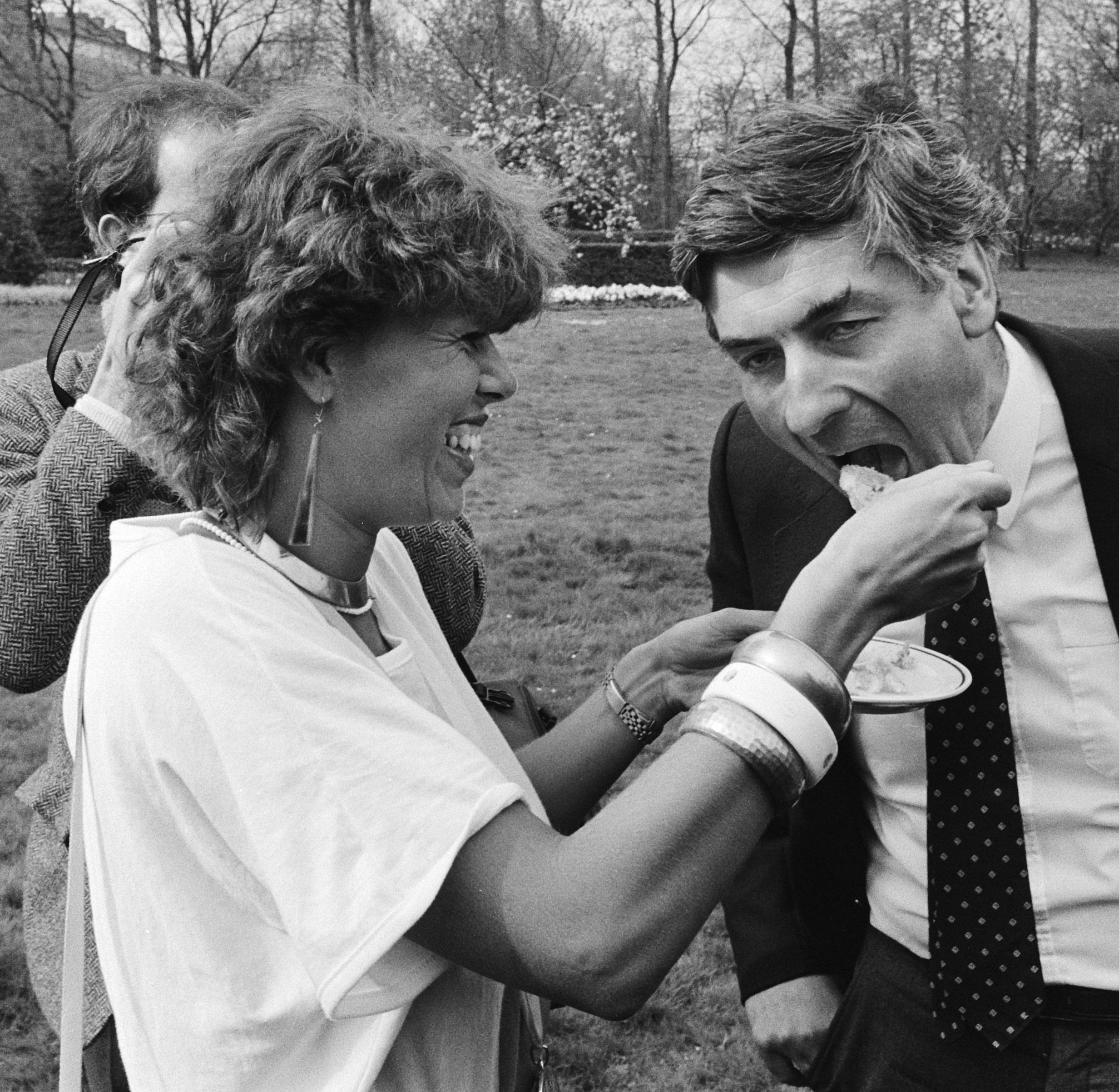 Ontvangst van de dameshockeyploeg door premier Lubbers op het Catshuis na het behalen van de wereldbeker. Margriet Zegers geeft premier Lubbers een hapje taart